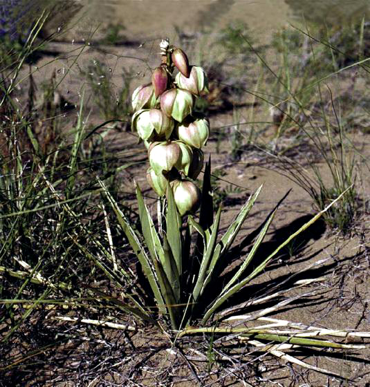 Yucca harrimanniae subsp. sterilis